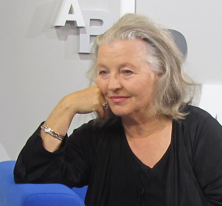 Schauspielerin Hanna Schygulla auf der Frankfurter Buchmesse 2013, auf dem Blauen Sofa, anlässlich der Veröffentlichung ihrer Autobiographie Wach auf und träume (Verlag Schirmer/Mosel)